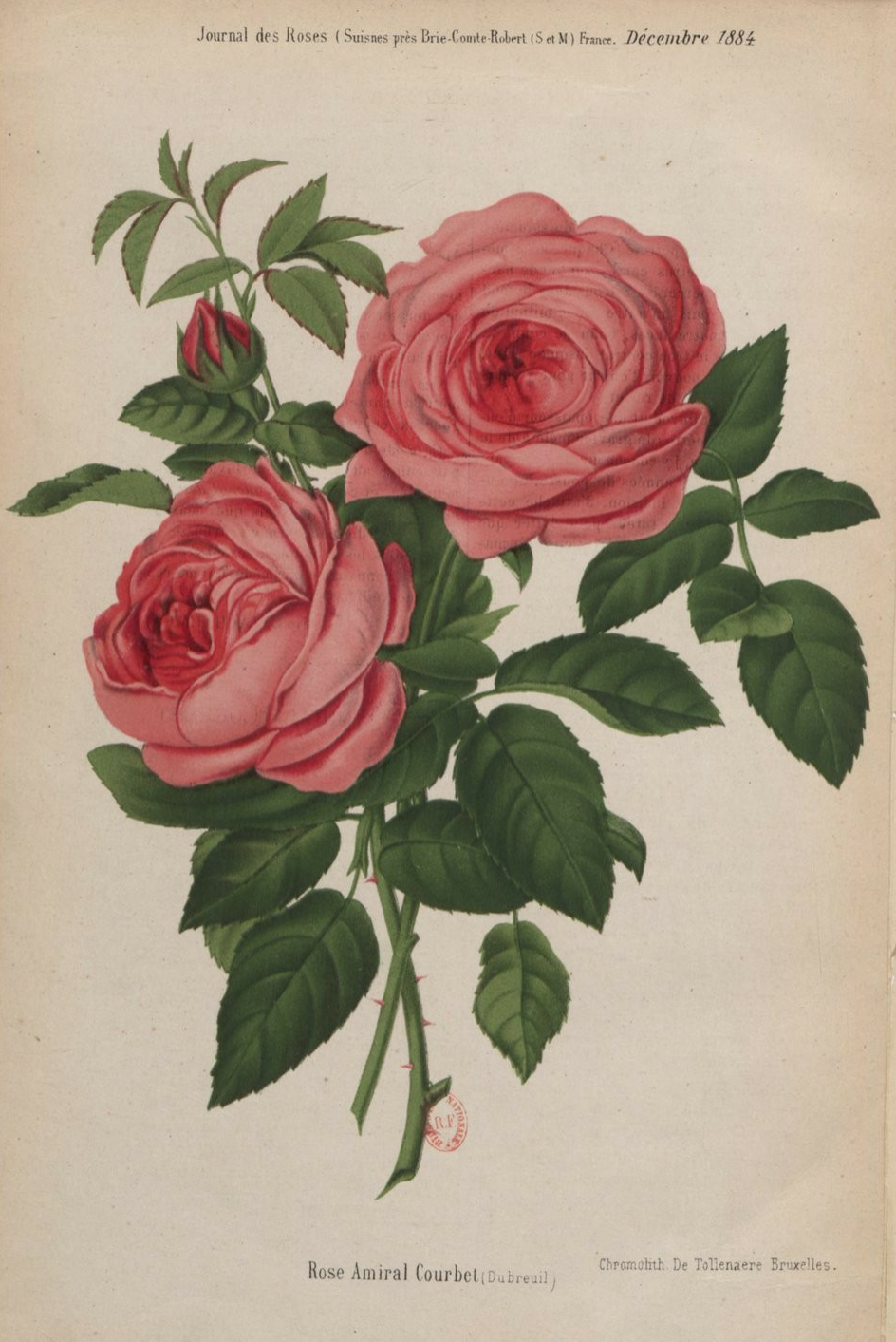 Hybride remontant 'Amiral Courbet' obtenu en 1881 et mis au commerce en 1884 par Francis Dubreuil. Illustration in Journal des roses, décembre 1884.